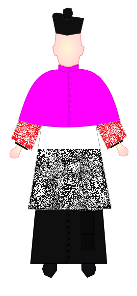 Veste da canonico della collegiata di san vittore martire di Corbetta (MI) - Italy